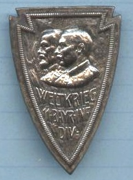 11. Bayerische Infanterie-Division, Kappenabzeichen, 1916